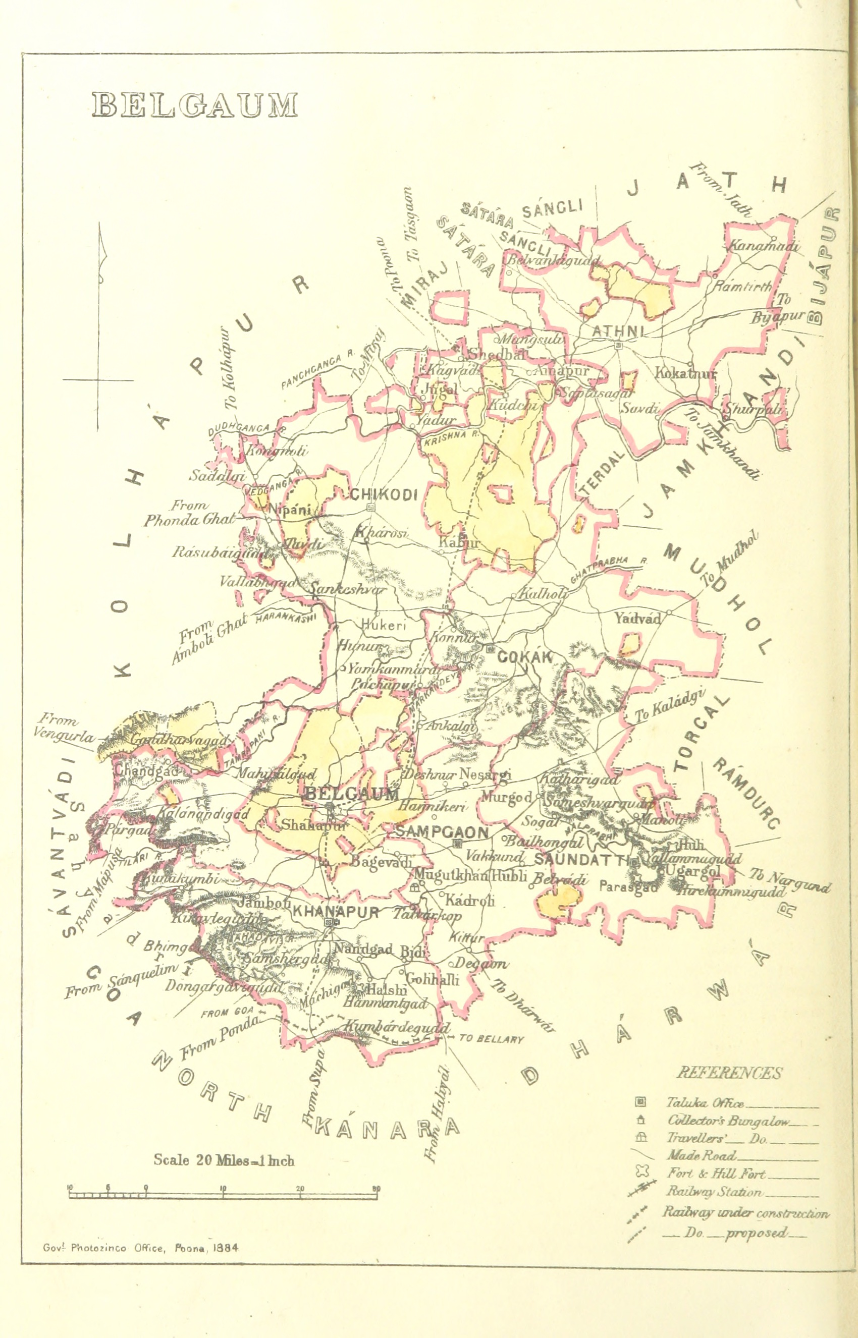 Belgaum, India. 1896 map.